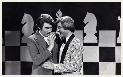 El actor Julio Jung en junto al cantante Antonio Prieto en El Show de Antonio Prieto, Canal 13 de Argentina.